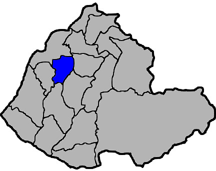 中華民國臺灣省苗栗縣苗栗市。KJ (talk)繪製。